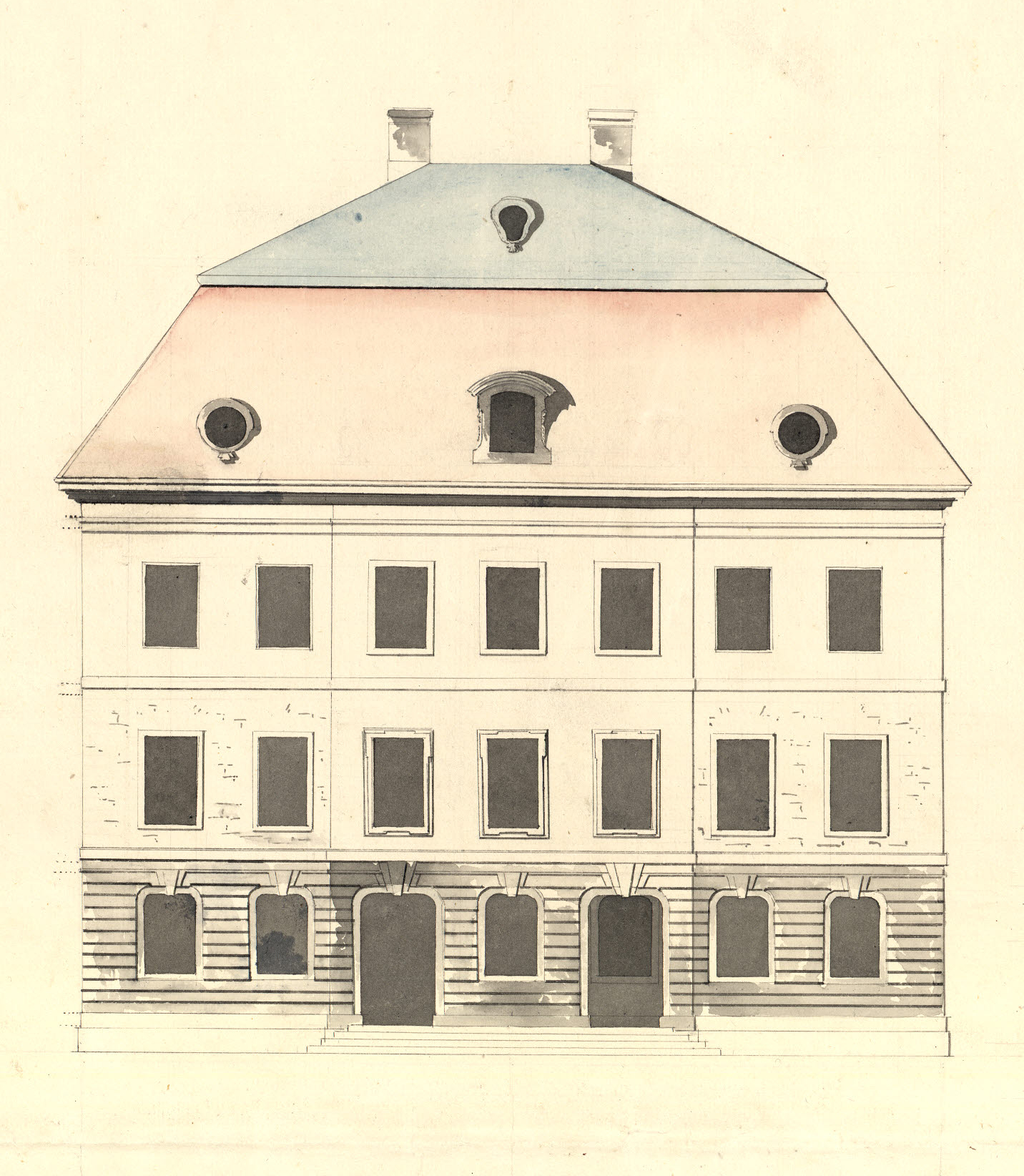 Bygglovsritning av Stora Daurerska huset från 1760. Carl Michael Bellmans födelsehem. Senare bostad åt Christopher Polhem.